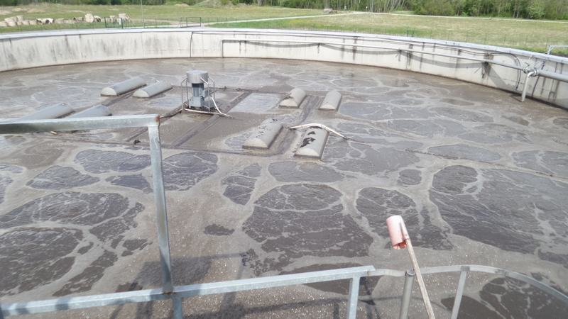 Jõgeva reoveepuhasti töötav bioreaktor